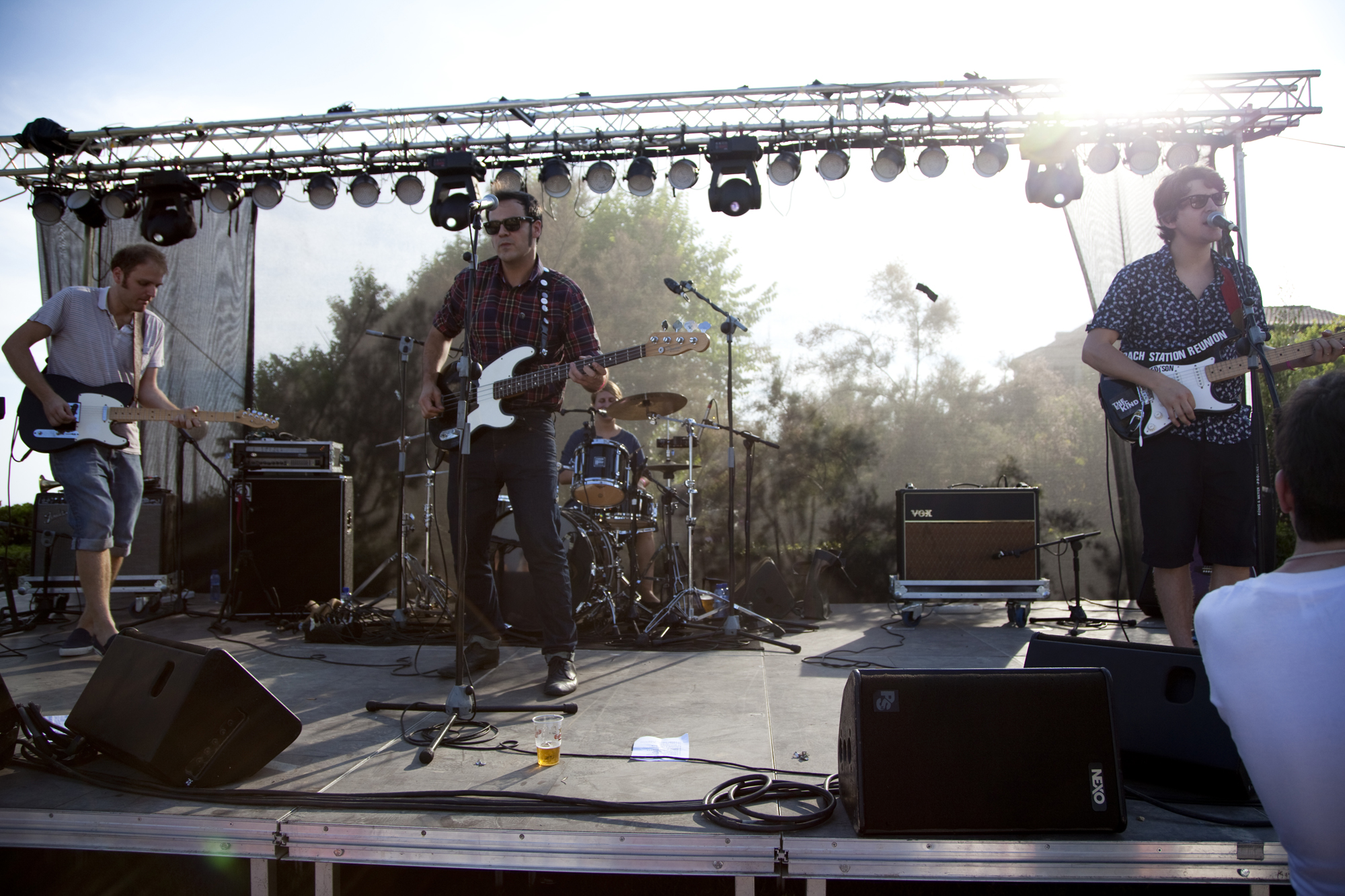 El grup barcelonès de jangle pop Fred i Son.